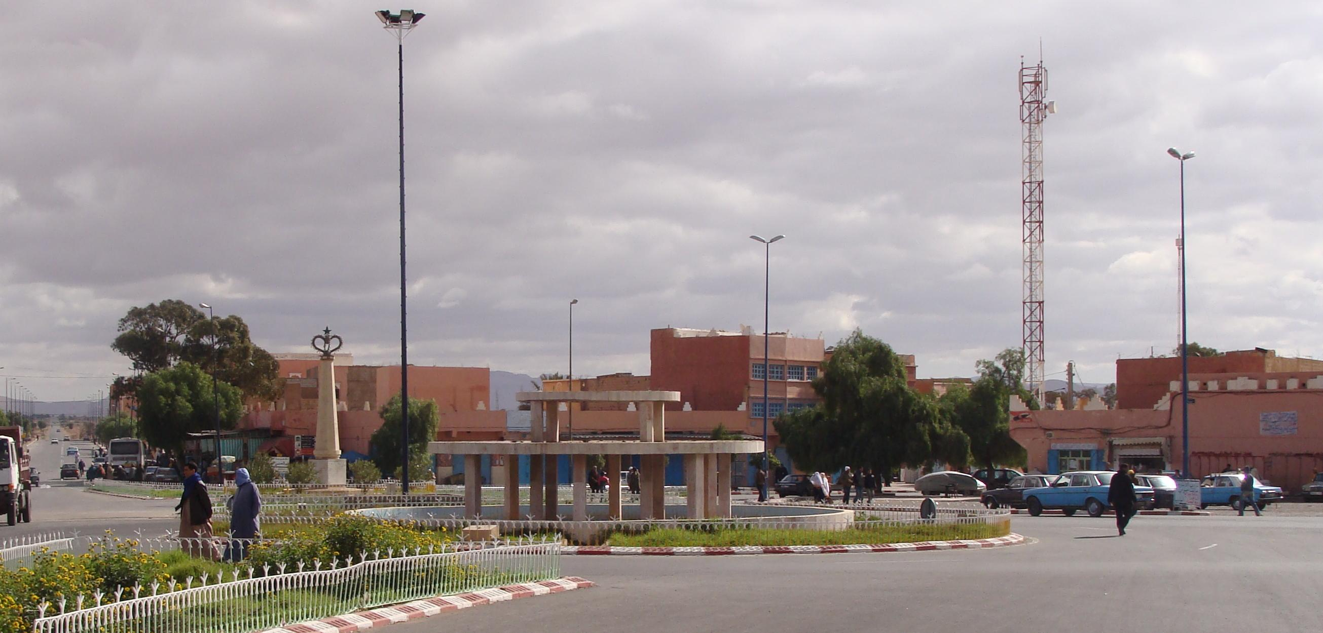 Centre ville